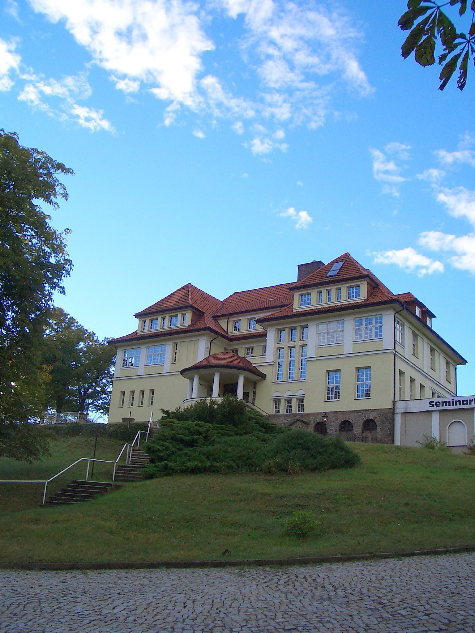 Das Seminarhaus Stubenberg bei Gernrode in Sachsen-Anhalt